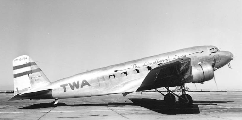 DC-2twaSF